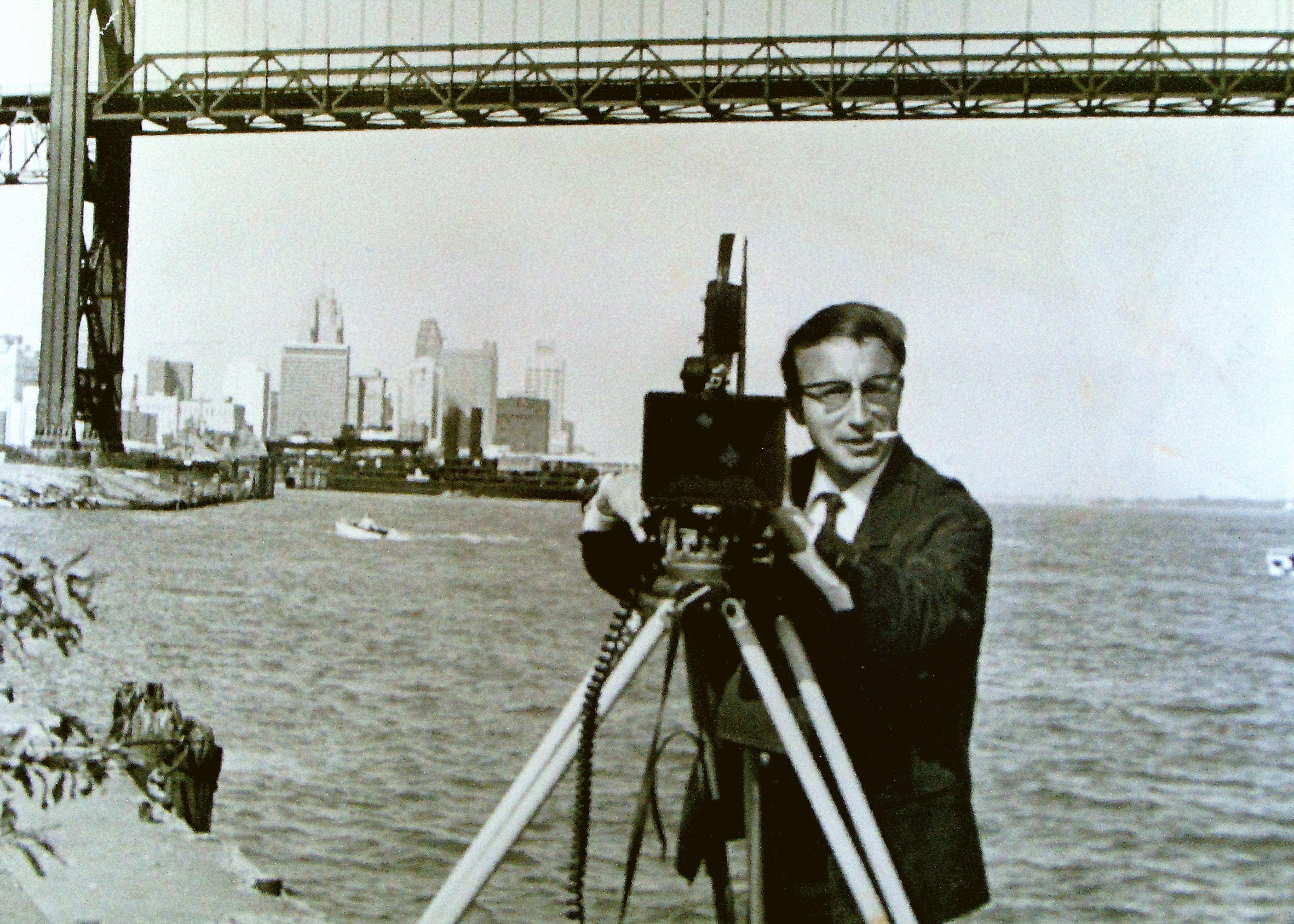 Walter Rüdel bei Dreharbeiten zu seiner Fernsehdokumentation "Wettlauf nach Uran". Bild mit Selbstauslöser